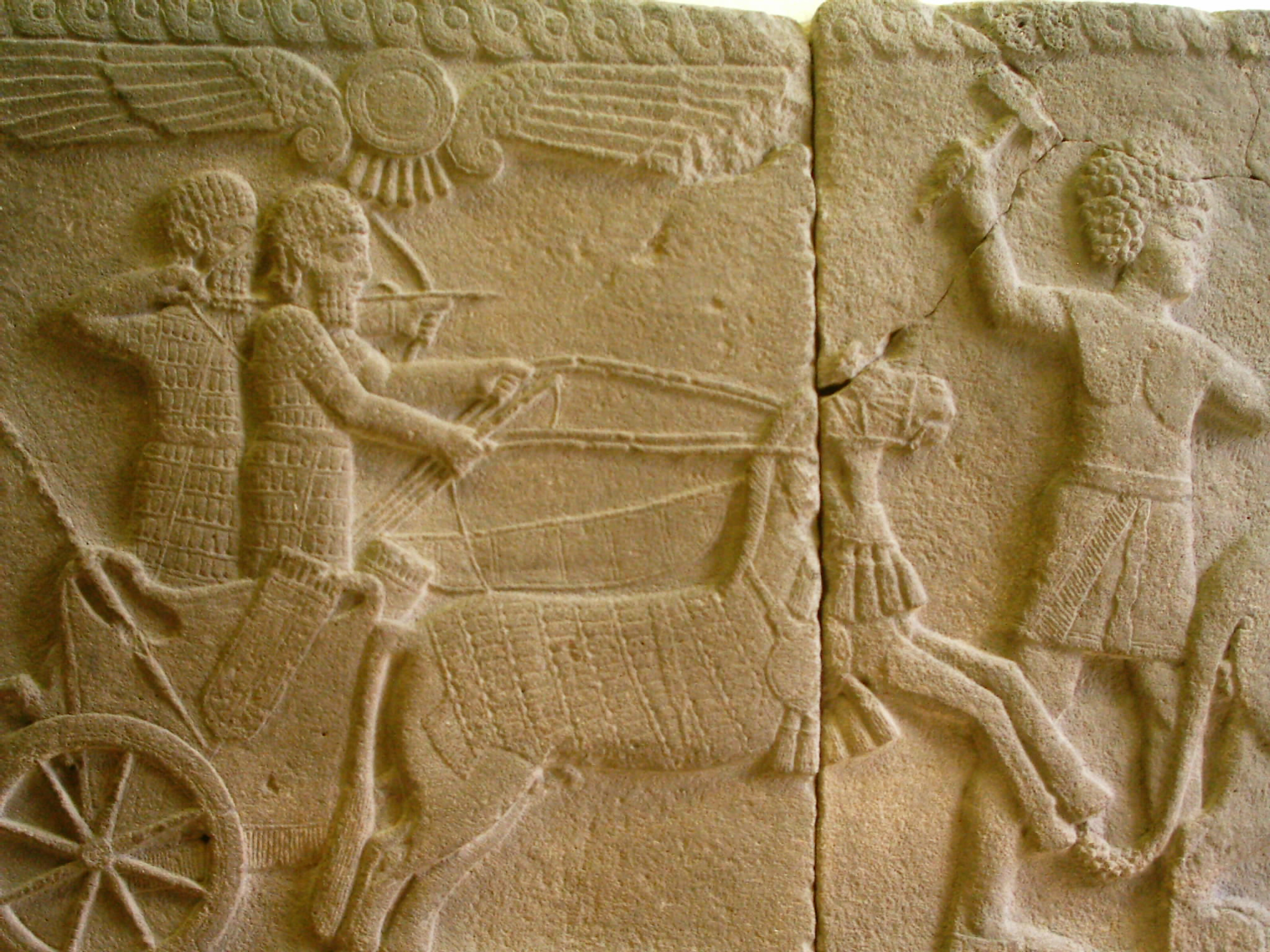 Reliefplatten – Löwenjagd (Ausschnitt), Ruinenstatte Sakcegözü. Um 750 v. Chr. Basalt. Pergamon Museum, Berlin.